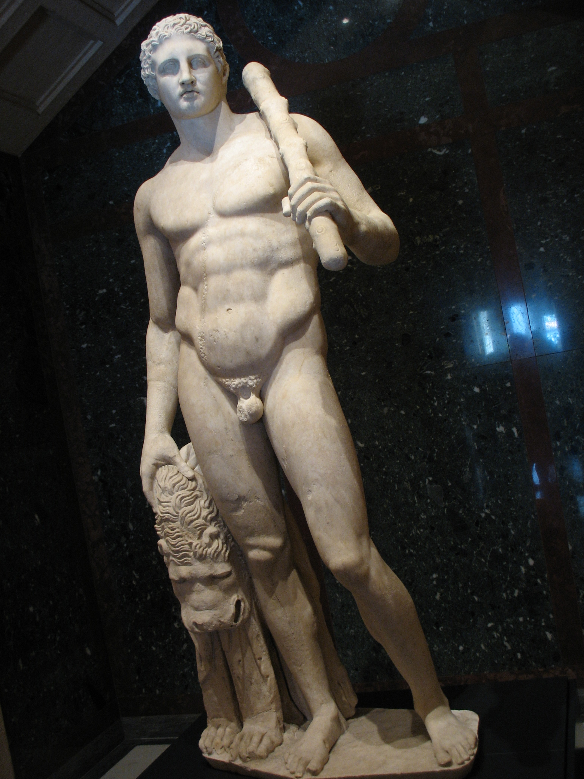 Heracles y el león de Nemea